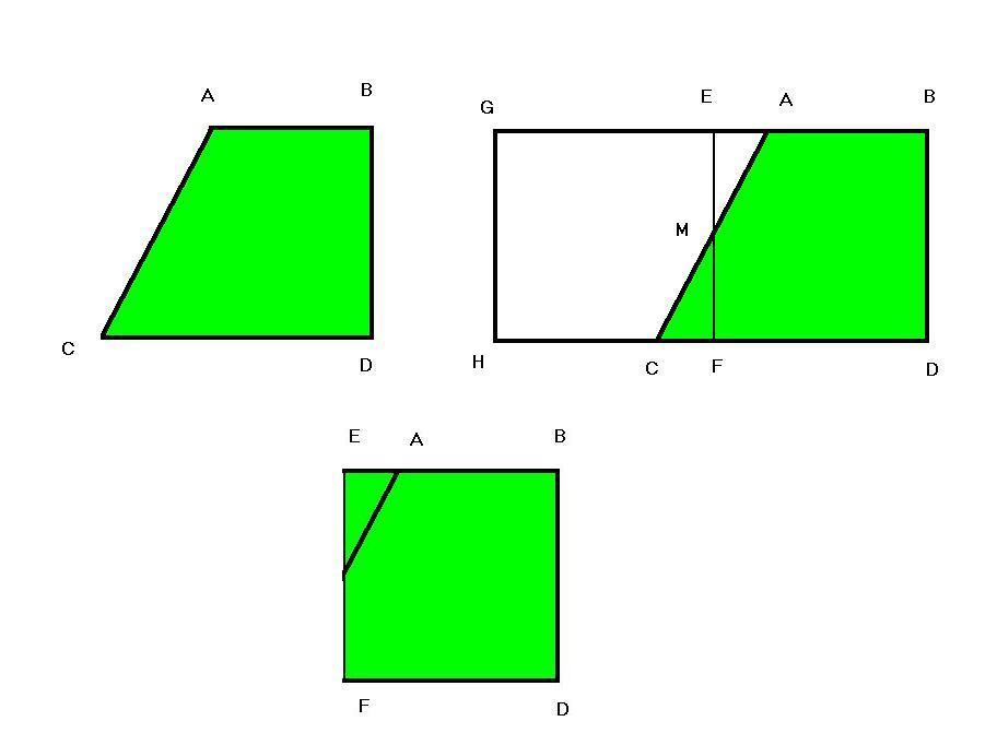 Area calculation